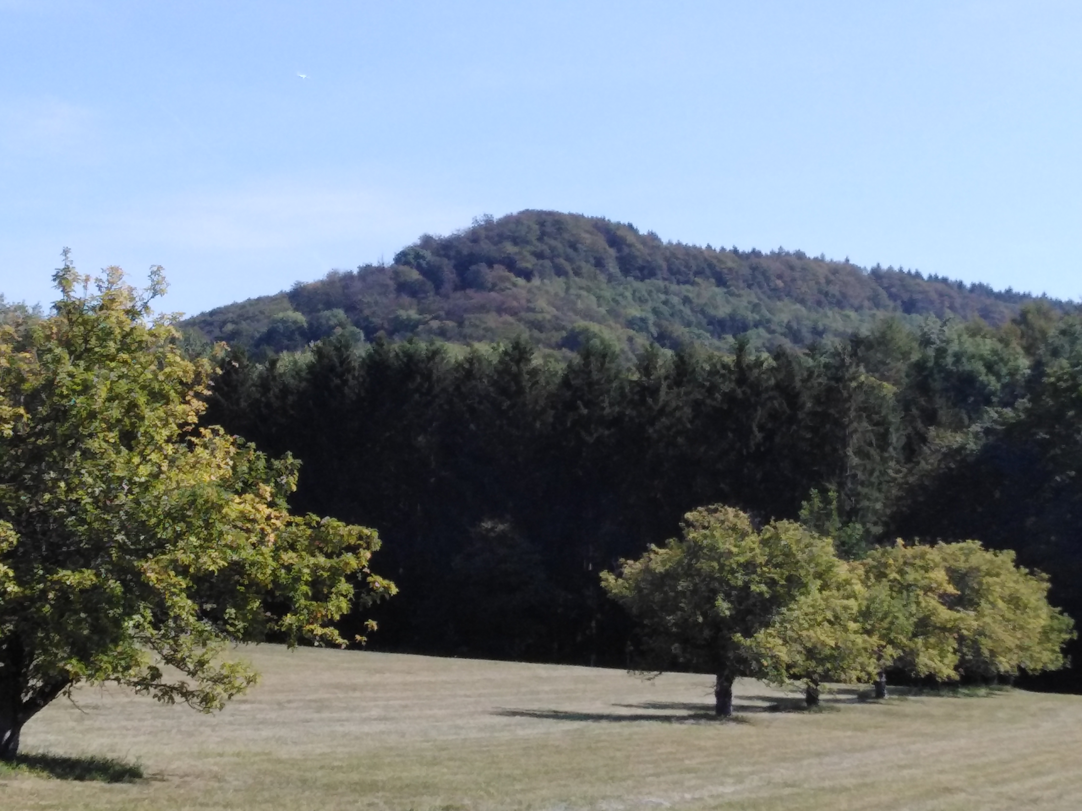 Kadelburg, Ortsteil der Gemeinde Küssaberg im Landkreis Waldshut in Baden-Württemberg. Der Kadelburger „Hausberg“ vom Egghau aus.